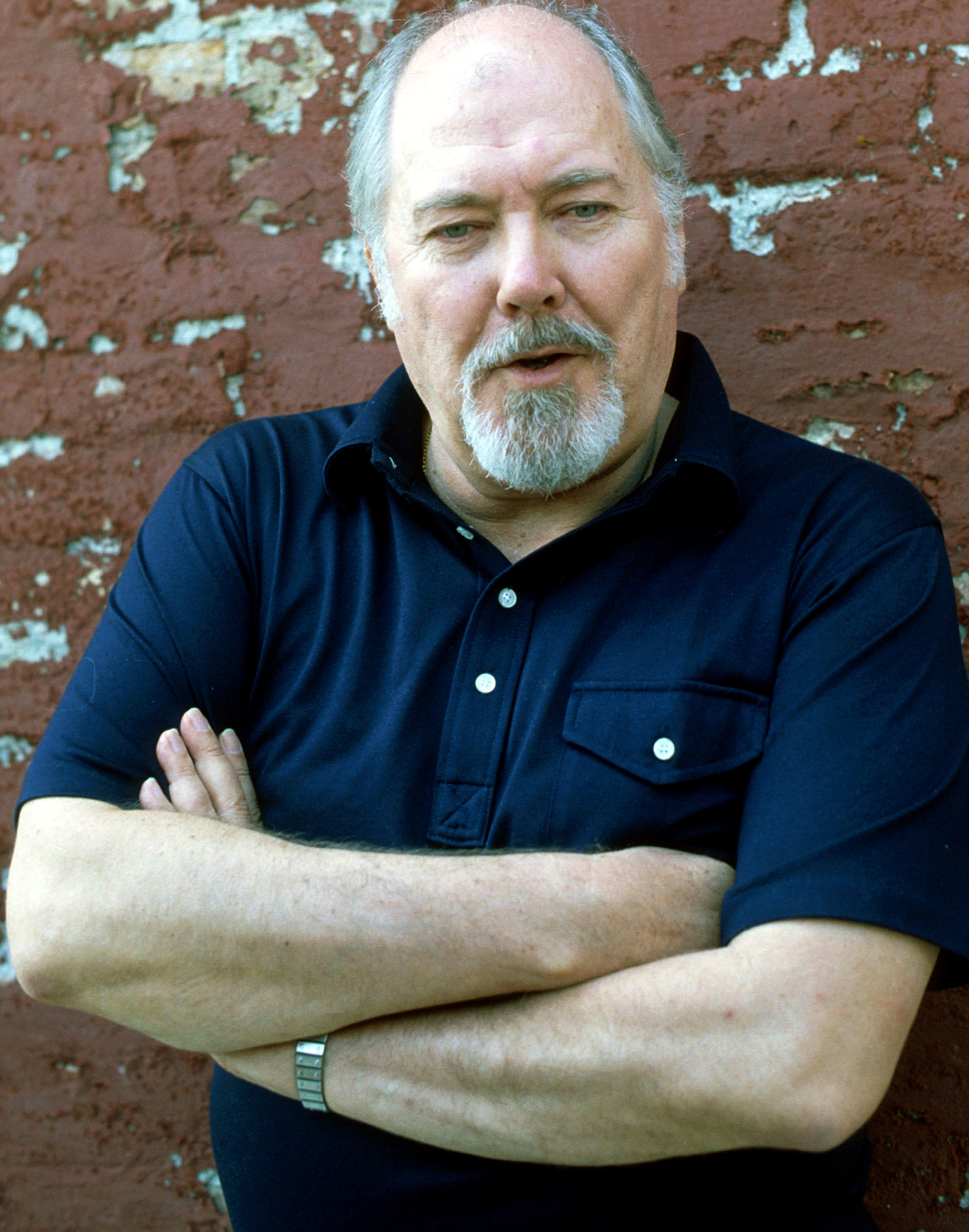 Il regista Robert Altman alla Mostra del Cinema di Venezia nel 1982